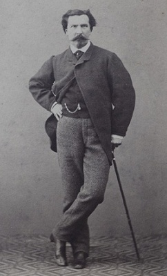 Cristiano Banti